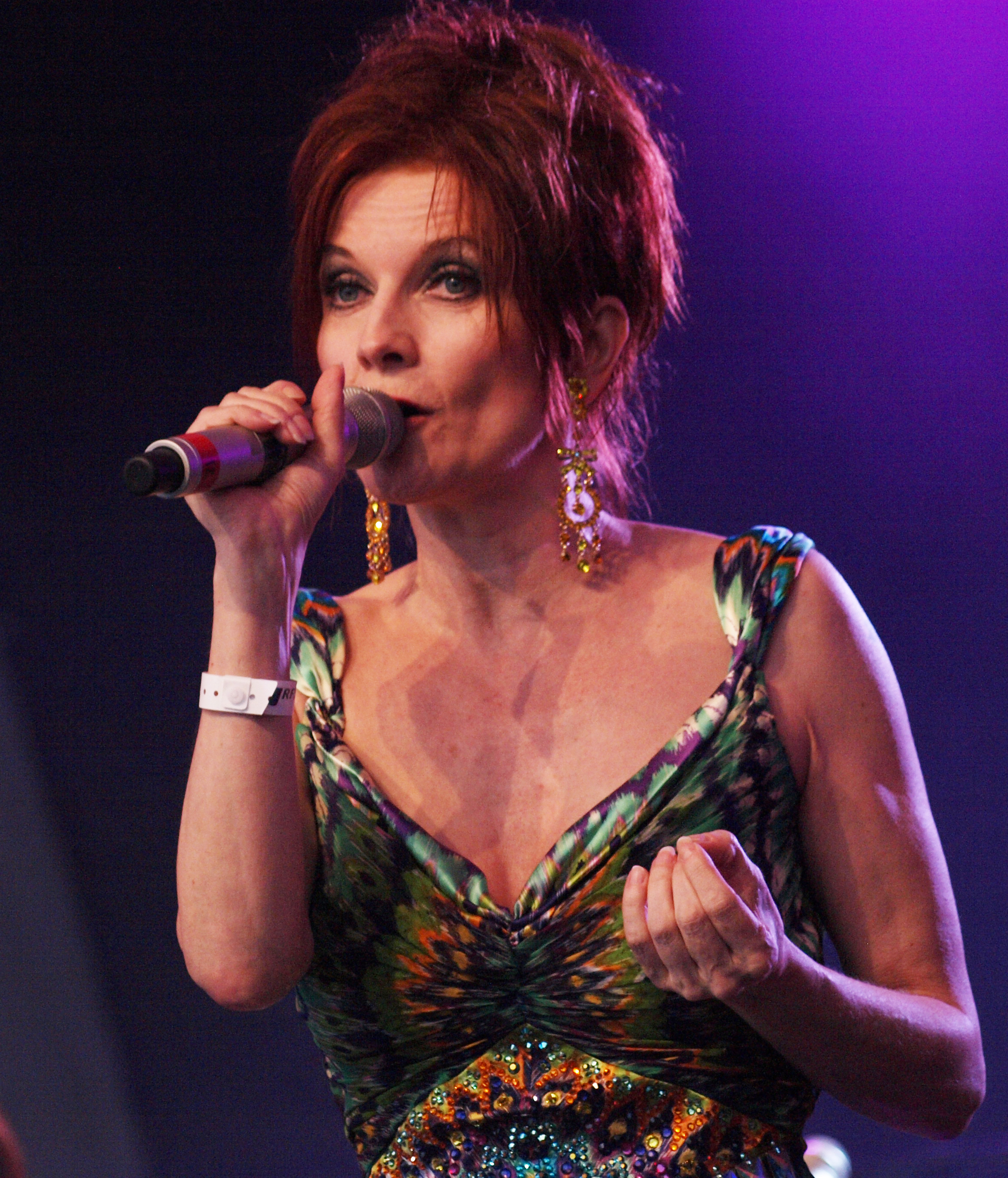 Anne-Lie Rydé at Stockholm Pride 2010.